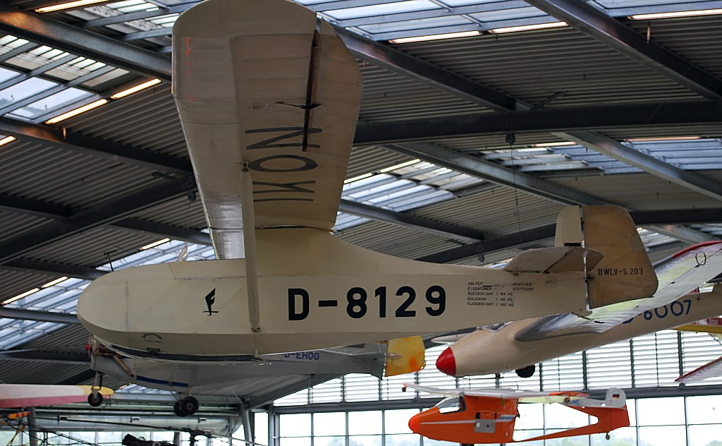 Hutter 17A